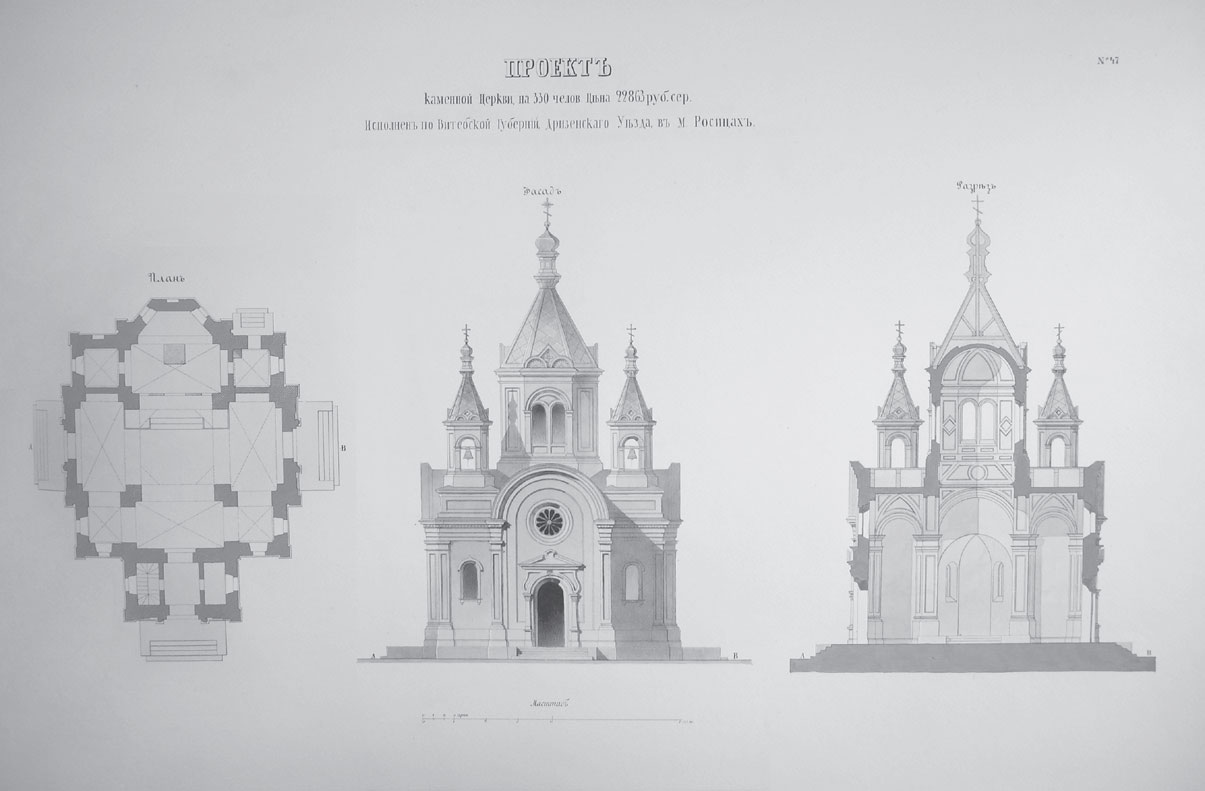 Беларуская (тарашкевіца): Росіца (Rosica). Царква